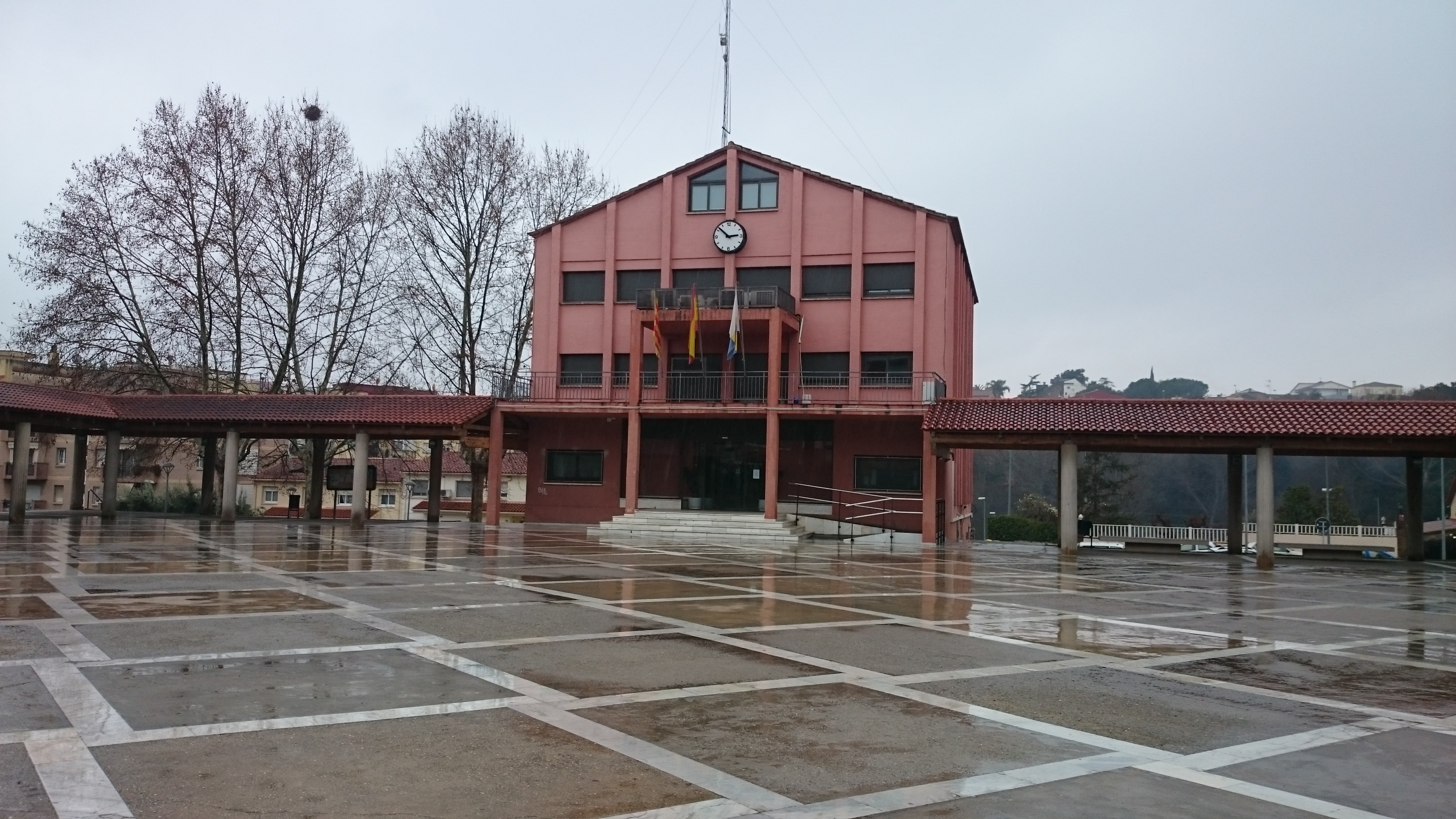 L'edifici del Consistori municipal acull les àrees de Presidència, Secretaria, Territori i Règim intern. Plaça de la Vila, 1 Polinyà (Barcelona) · 08213